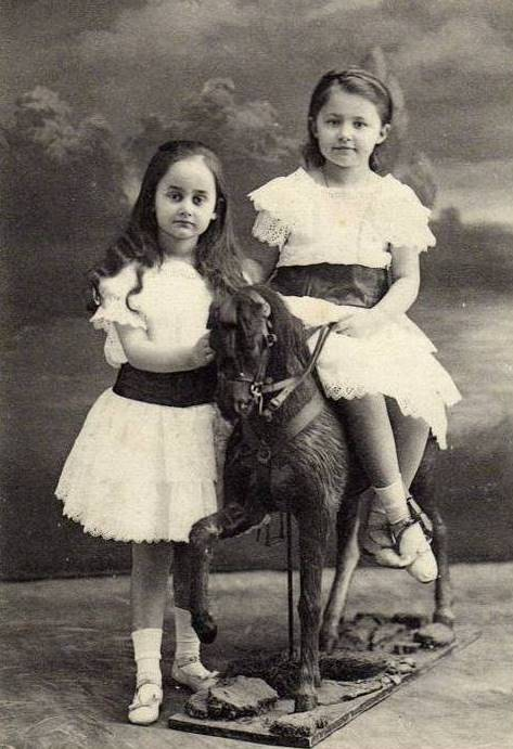 Sophie und Elisabeth von Luxemburg (andere Motive der Fotostrecke: 1 und 2)